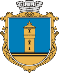 Wappen Dolynska